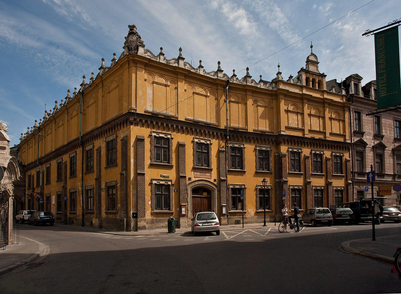 To w tym narożnym budynku mieści się Muzeum Czartoryskich. Tu właśnie można zobaczyć Damę z łasiczką Leonarda da Vinci. Plany przebudowy pałacu